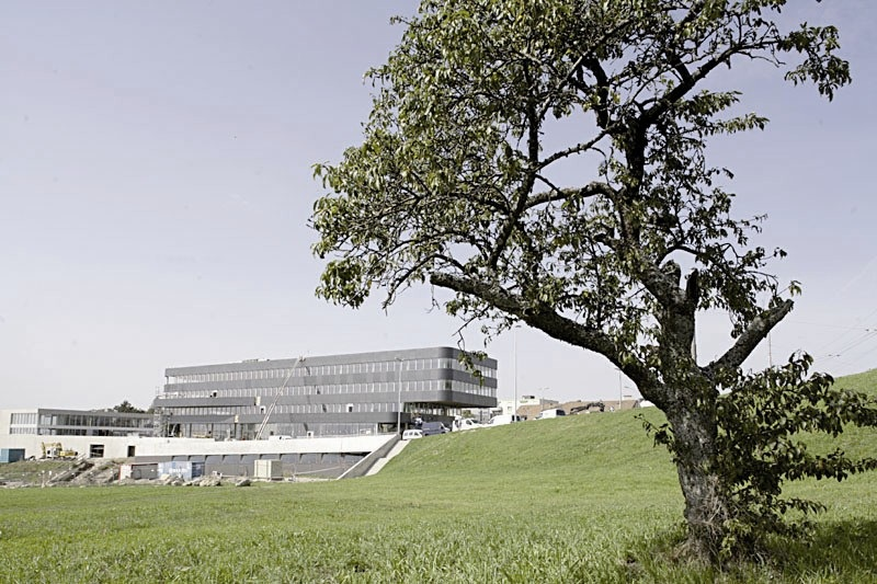 Vue d' ensemble Biopôle